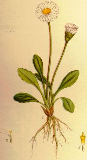 Tusensköna (Bellis perennis) växten efter ett vildväxande (antagligen förvildat) exemplar kantblomma (förstorad) mittblomma (förstorad)